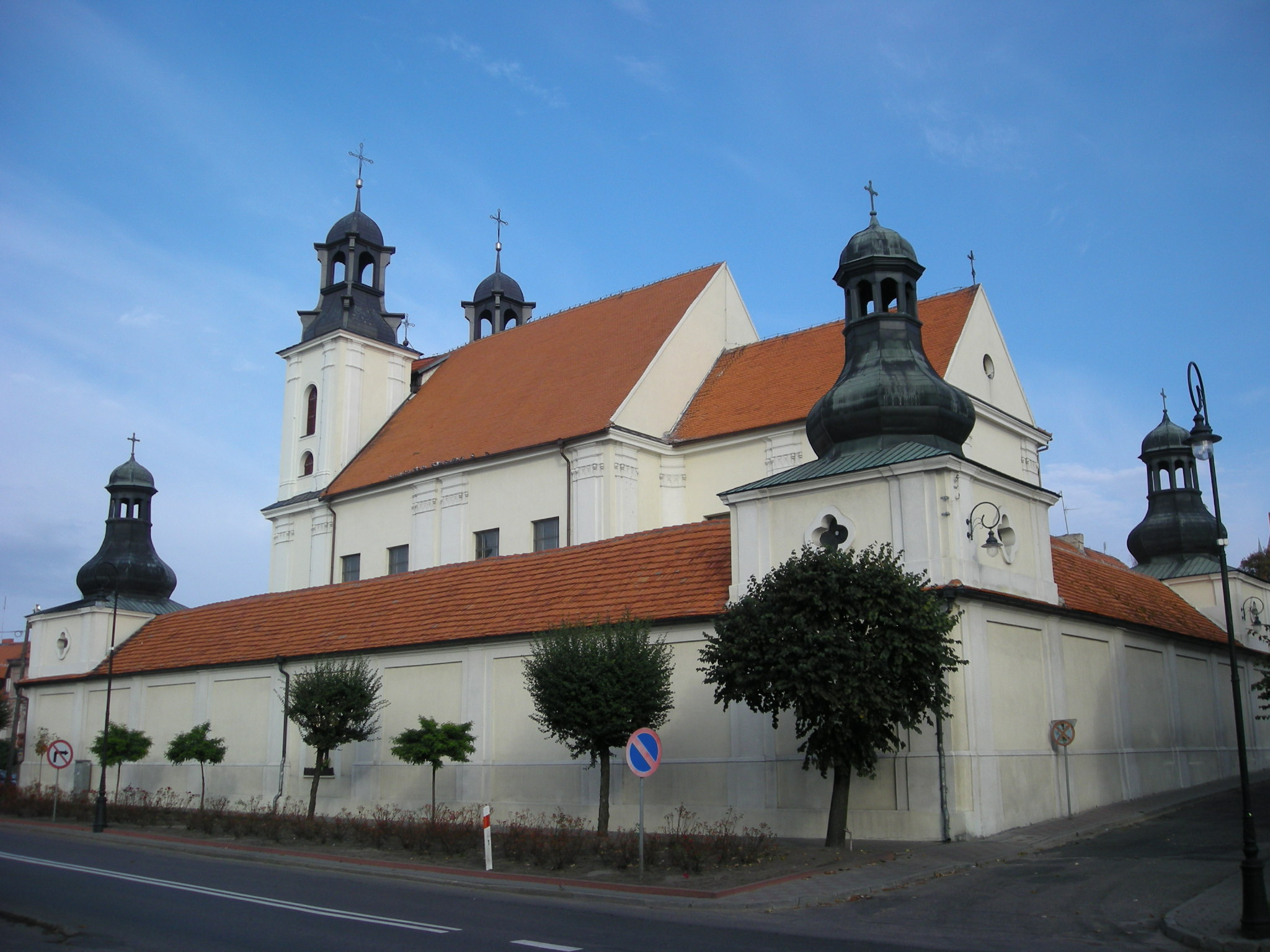 Kościół poklasztorny w Kcyni